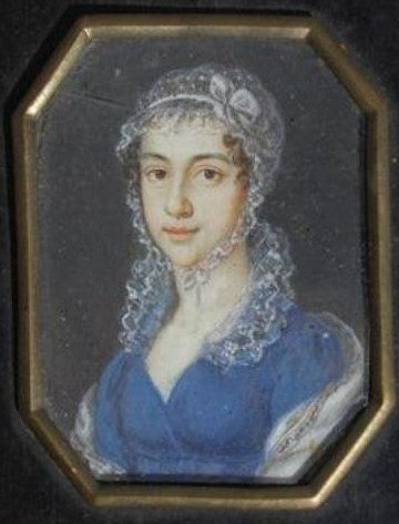 Екатерина Дмитриевна Сонцова, ур. Черткова (1793—1867)